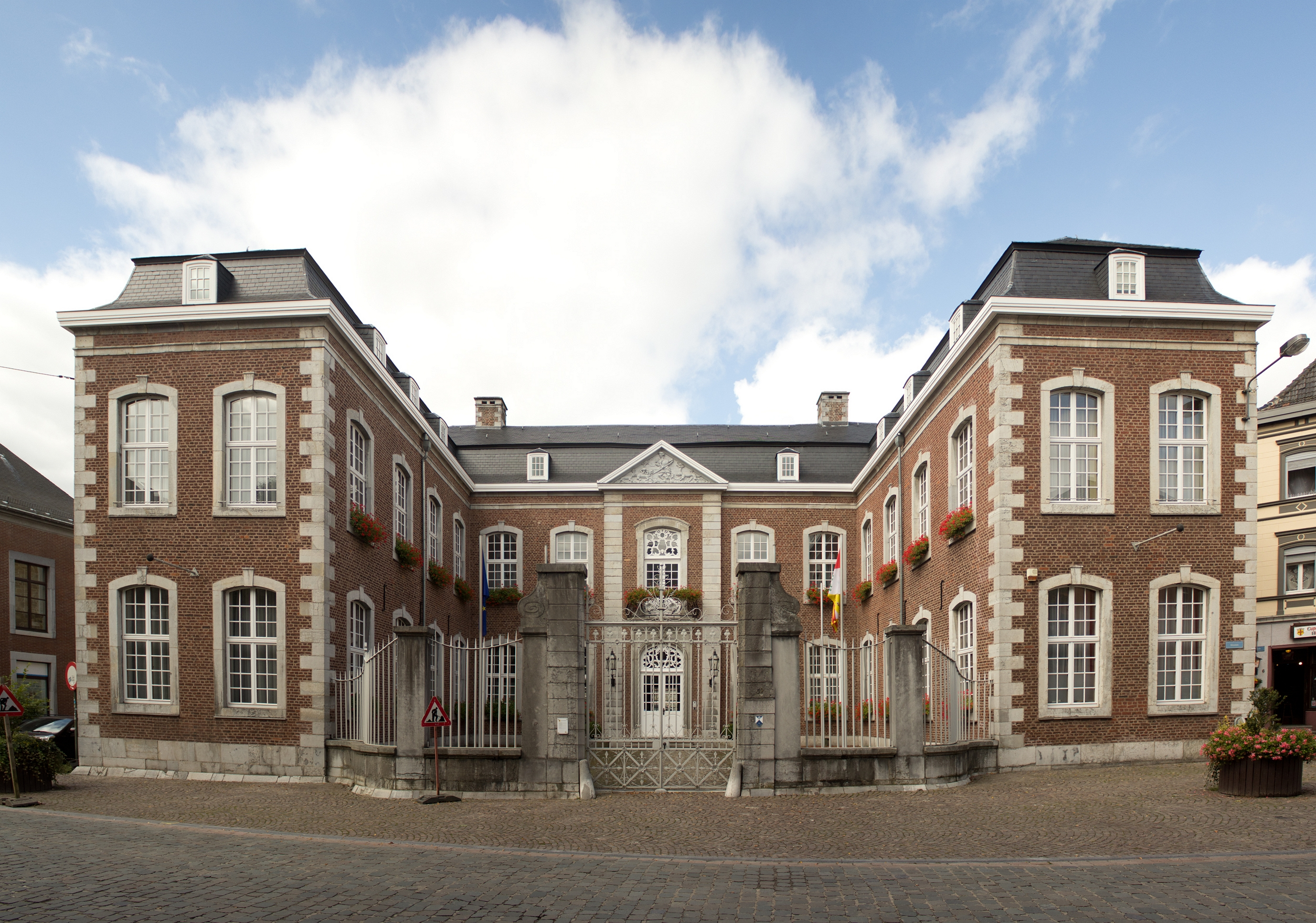 Regierung der Deutschsprachigen Gemeinschaft Belgiens, Eupen